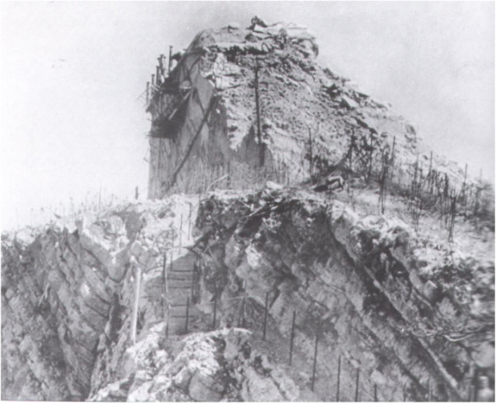 Austro-hungarian Fort "Posten Vezzena"